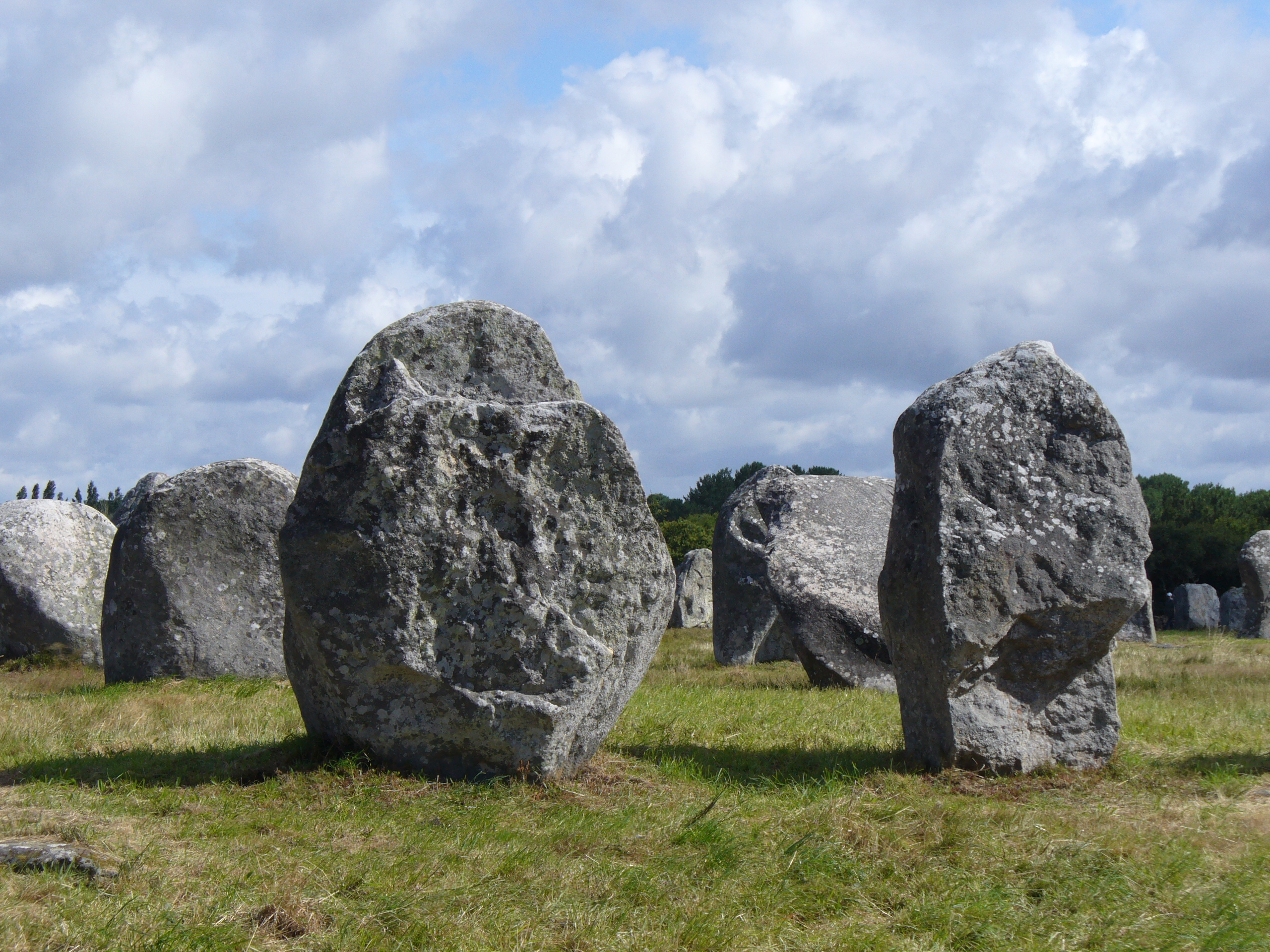 1099 Menhire,bis zu 4 Meter hoch,von Ost nach West in 1167 Meter Langen Alignements(Steinreihen) in einem Halbkreis(Cromlechs) endend. (Jungsteinzeit, Neolithikum ,Neolithic ,Néolithique 4500-2300 v.Chr.) Megalithanlage von Le Ménec, Carnac ,Departement Morbihan ,Bretagne